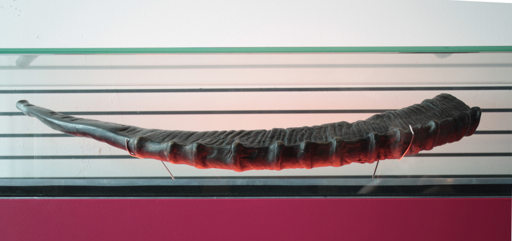 Sjofar (hoorn), 388 A shofar is a horn used for Jewish religious purposes.